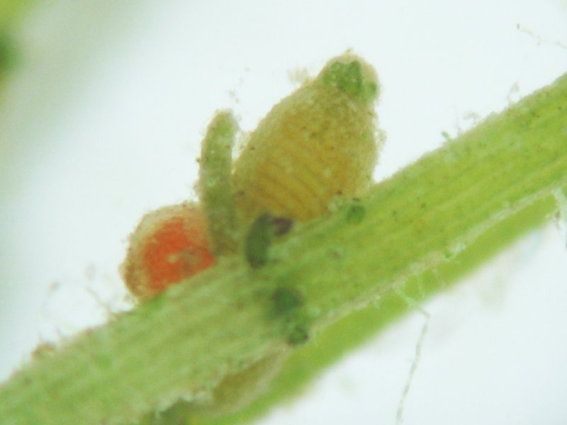 Gegensätzliche Armleuchteralge Chara contraria, Antheridium & Gametangium (Oogon), Müritz-Gebiet